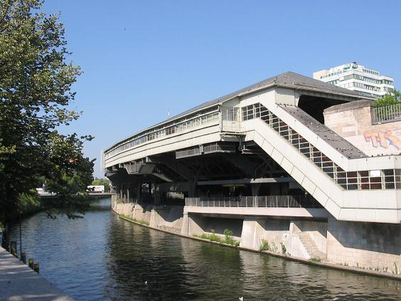 U-Bahn Berlin, station Hallesches Tor (line u1), with Landwehrkanal